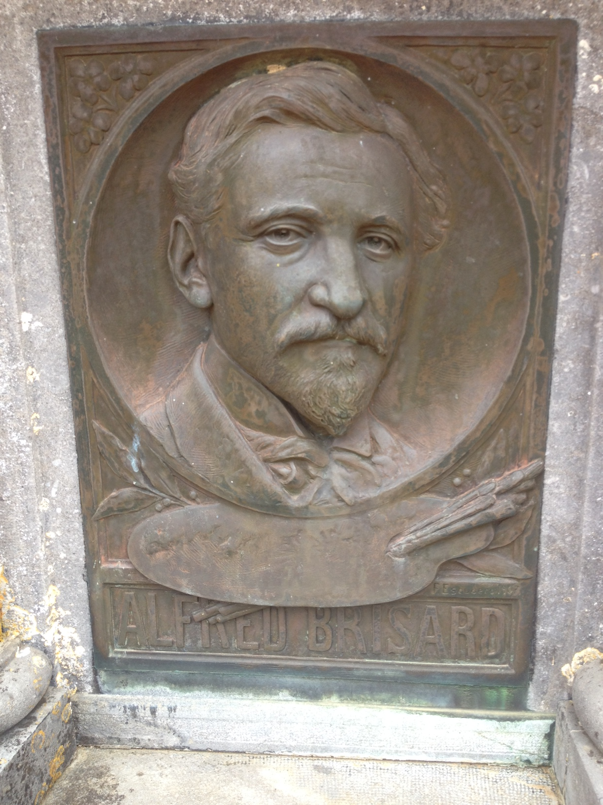 TOMBE DE ALFRED BRISARD AU CIMETIERE DU MAGE